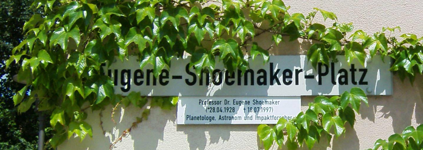 Eugene-Shoemaker-Platz in Nördlingen am Rieskratermuseum